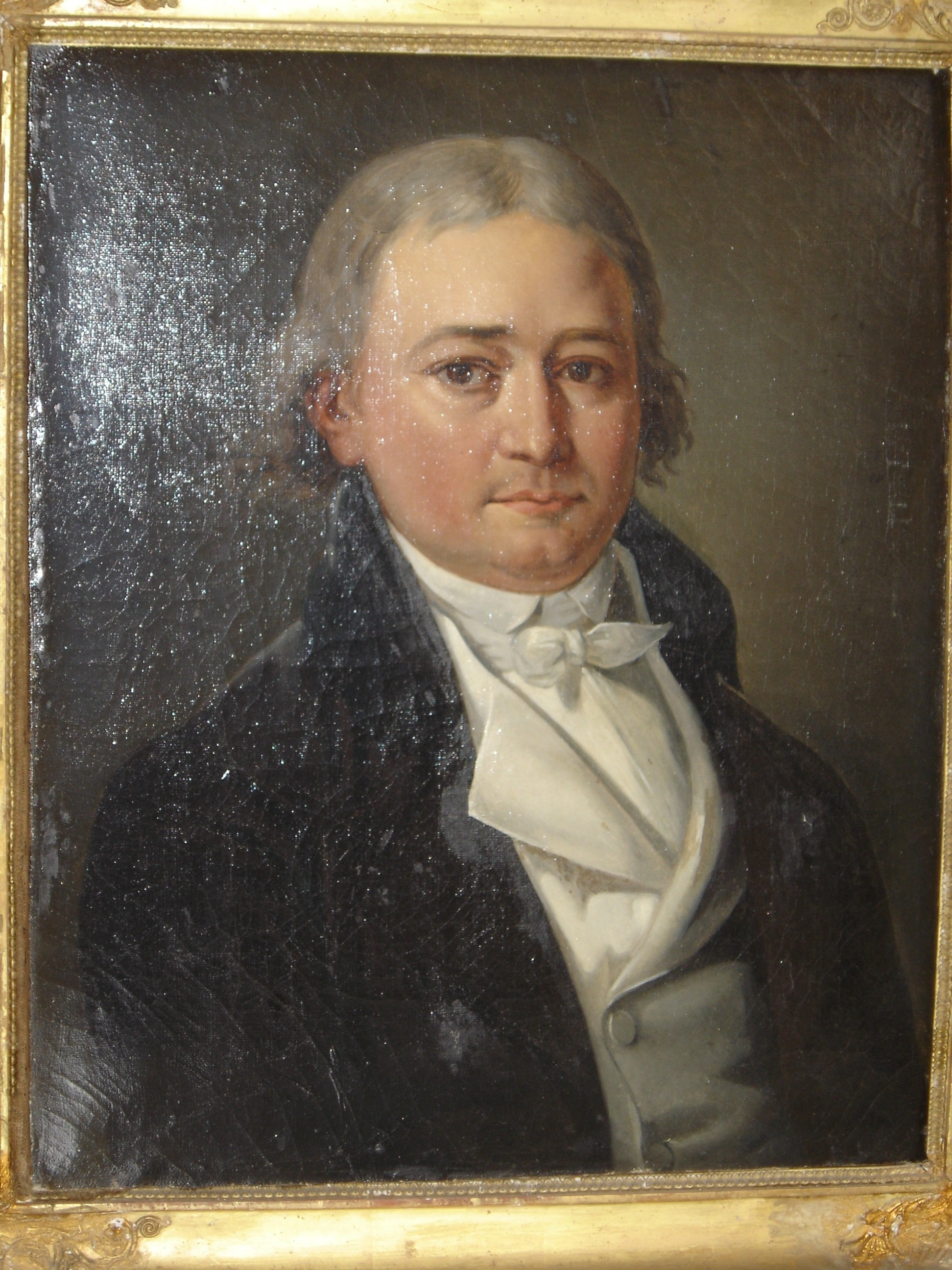 Portrait André Cornu